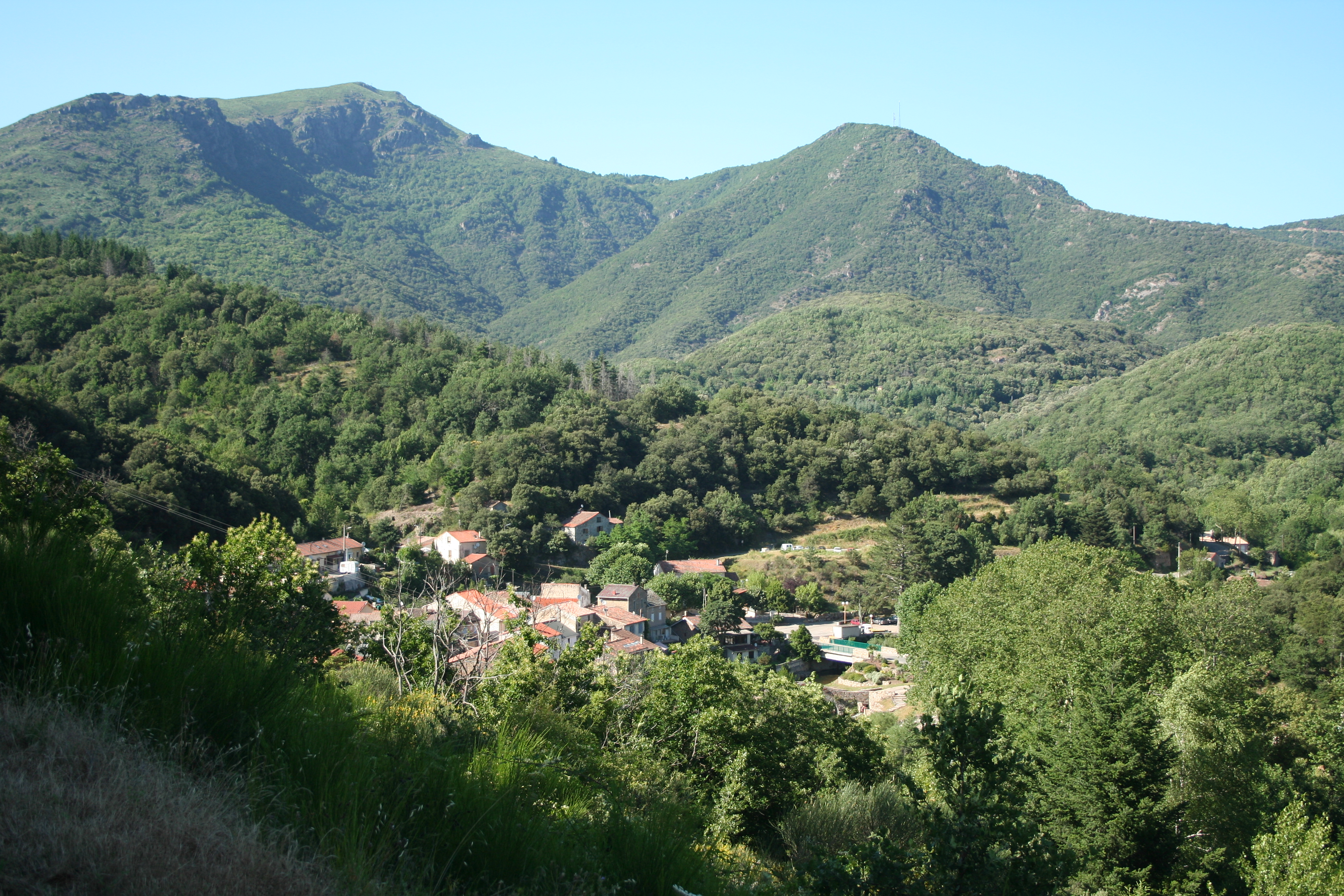 Saint-Geniès-de-Varensal (Hérault) - Plaisance et le Mont Marcou (1093 m)